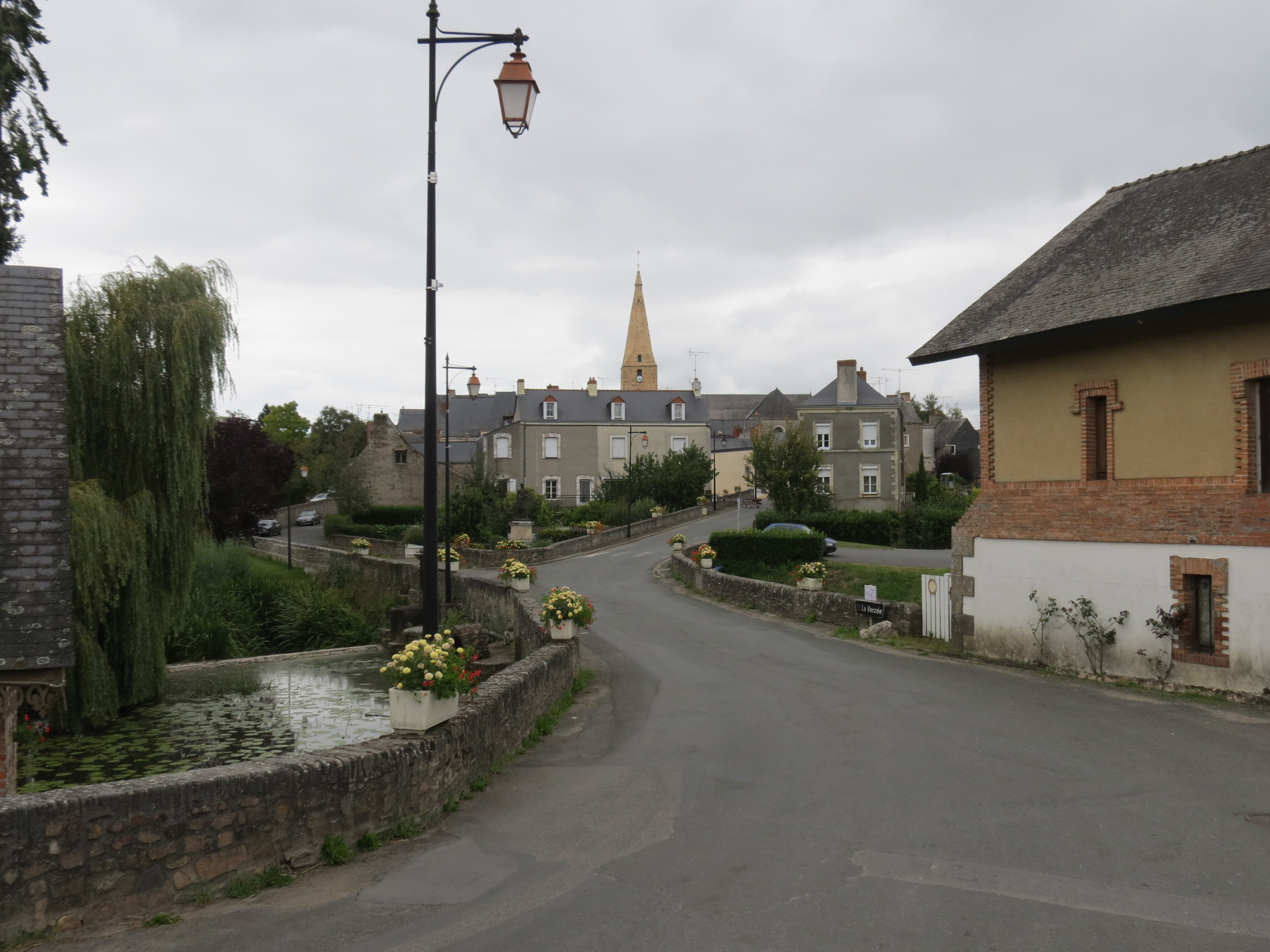 Le Bourg-d'Iré - le bourg vue du quartier St Jean.